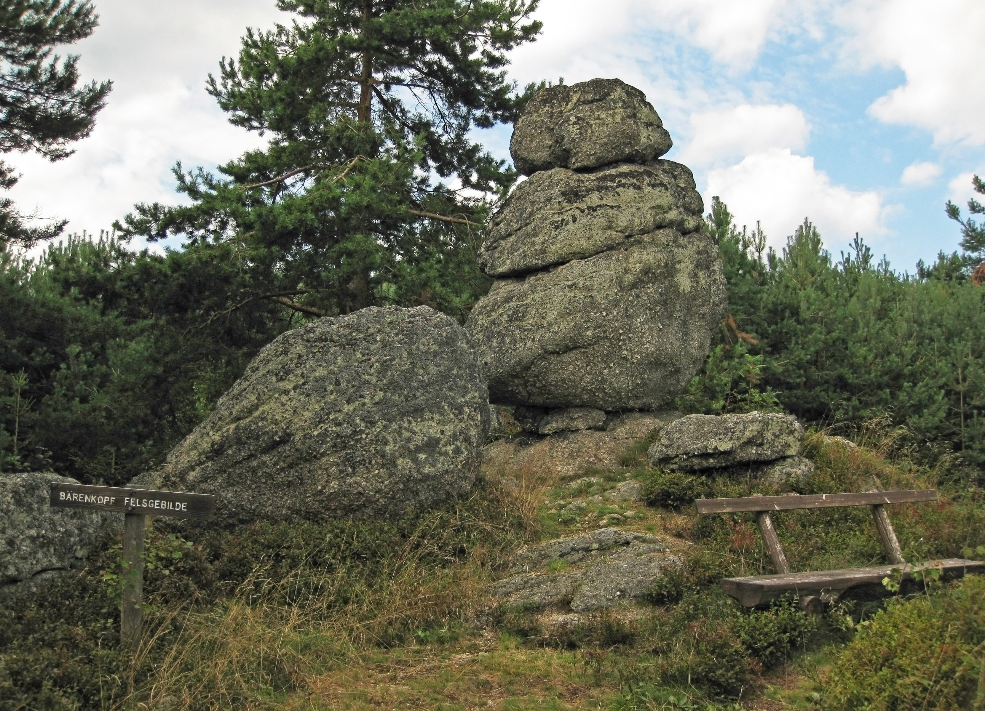 Der Naturpark Nordwald liegt am Westrand des Waldviertler Hochlandes zwischen Bad Großpertholz und Karlstift. This file shows the Nature Park with the ID 3089 in Austria.